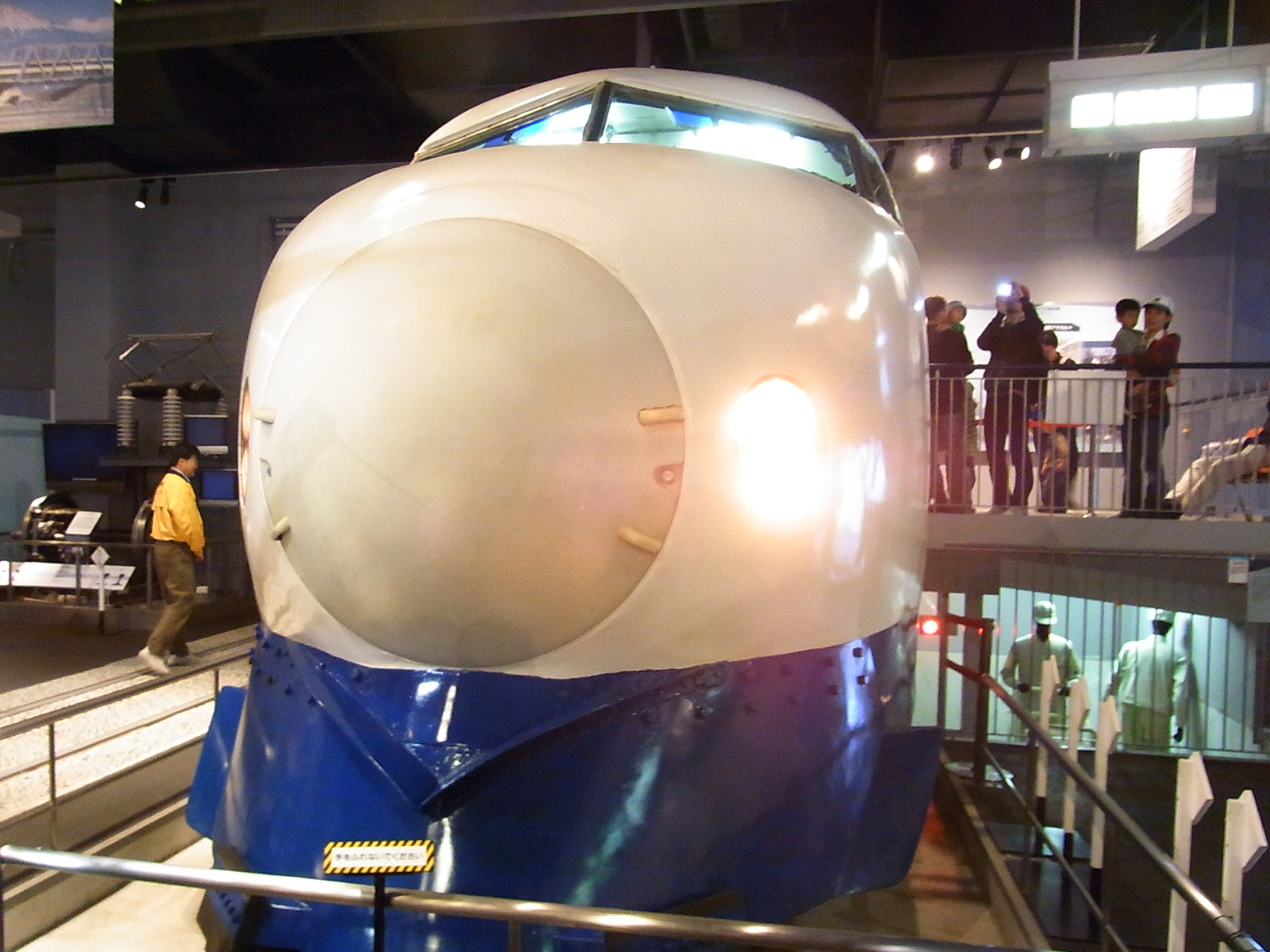 さいたま市 鉄道博物館